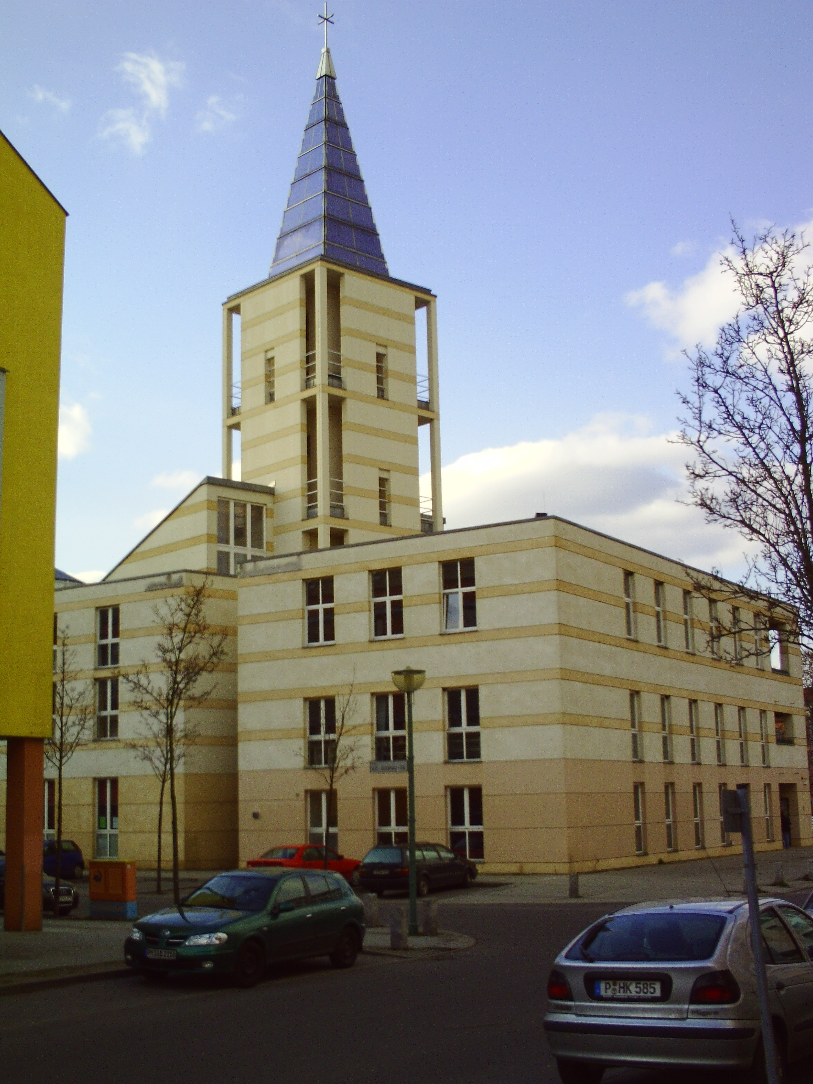 Kirche im Kirchsteigfeld, gestaltet von Augusto Romano Burelli